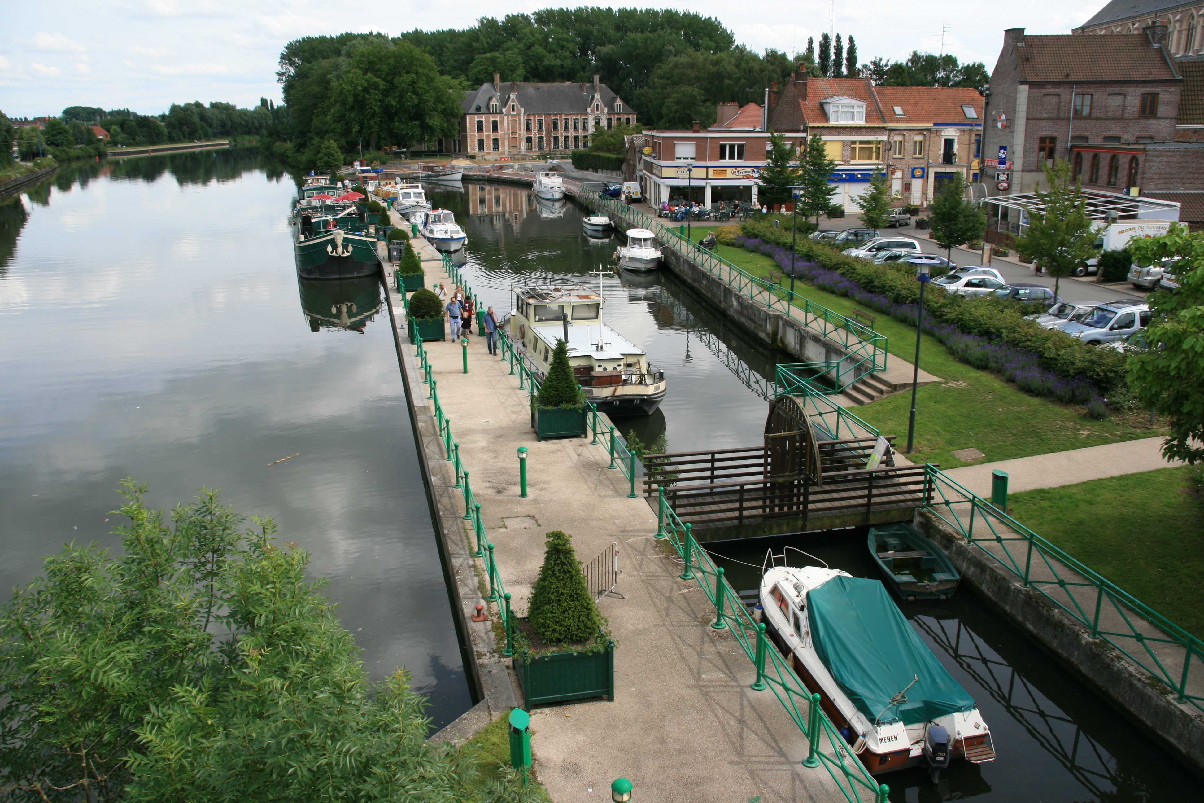 Photo prise en été 2007 par Johan BEN AZZOUZ